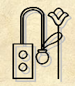 Hiéroglyphe du groupe Y représentant la palette du scribe et par extension, celui-ci.